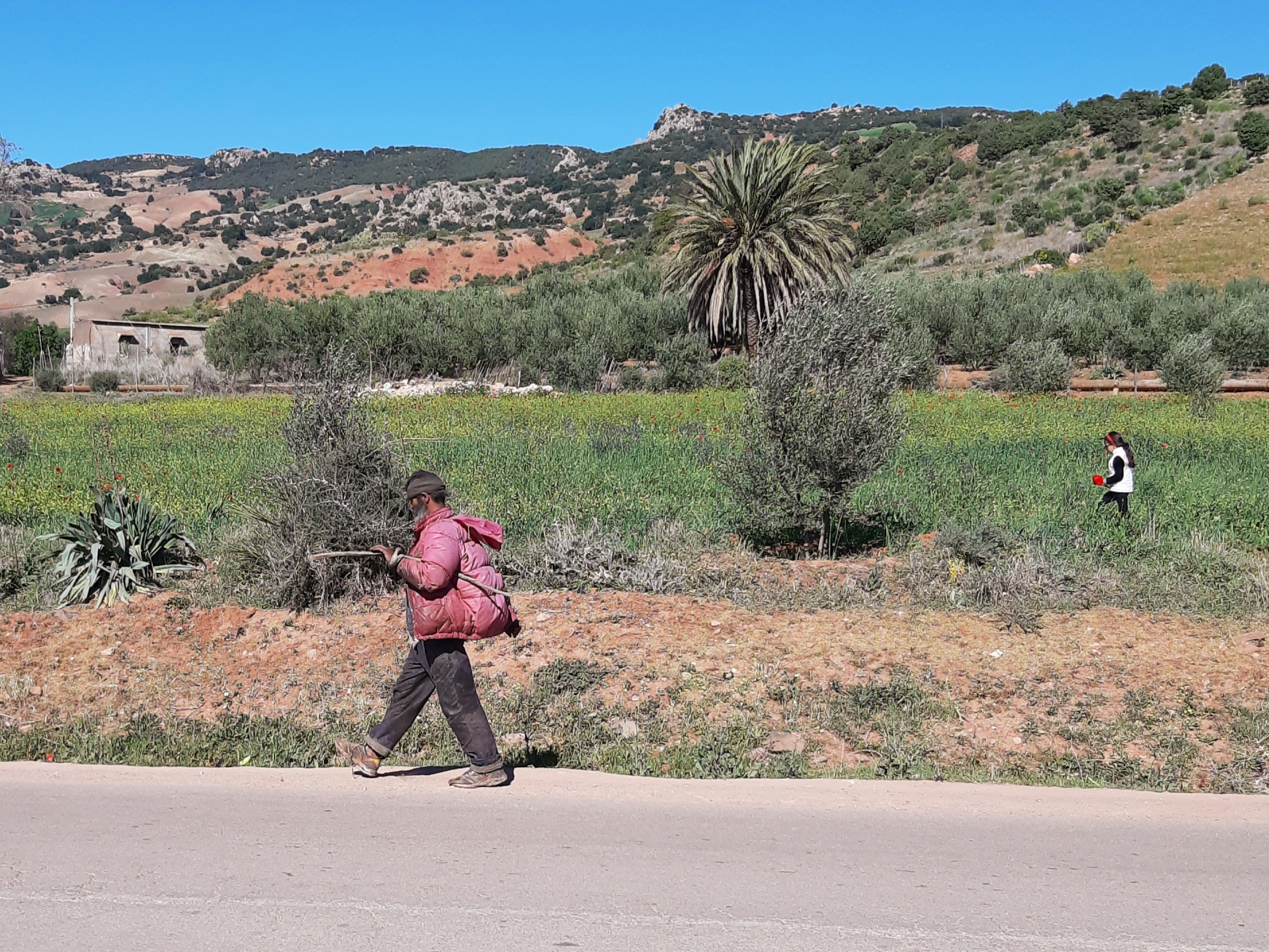 La marche à pied This is an image with the theme "Africa on the Move or Transport" from: Morocco